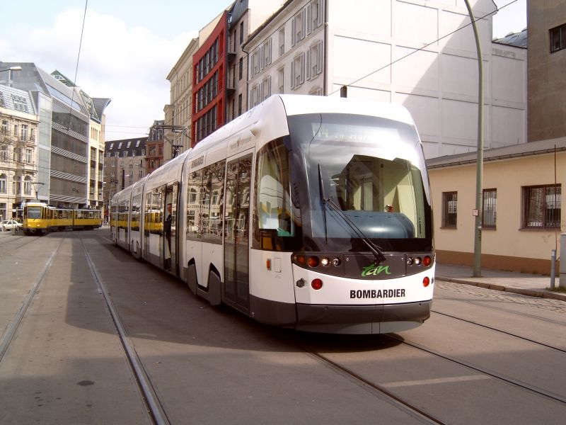 Incentro 374 für Nantes in Berlin am S Hackescher Markt